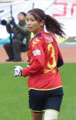 ２０１５皇后杯の鮫島彩選手